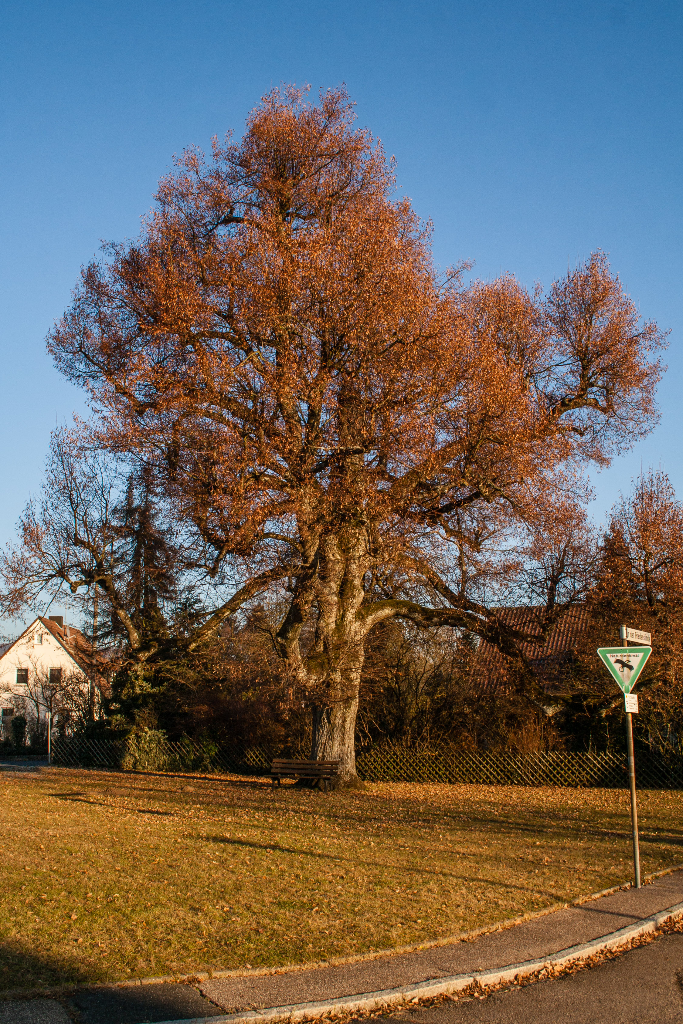 Unterhaidelbacher Friedenslinde, Naturdenkmal, Unterhaidelbach, Leinburg